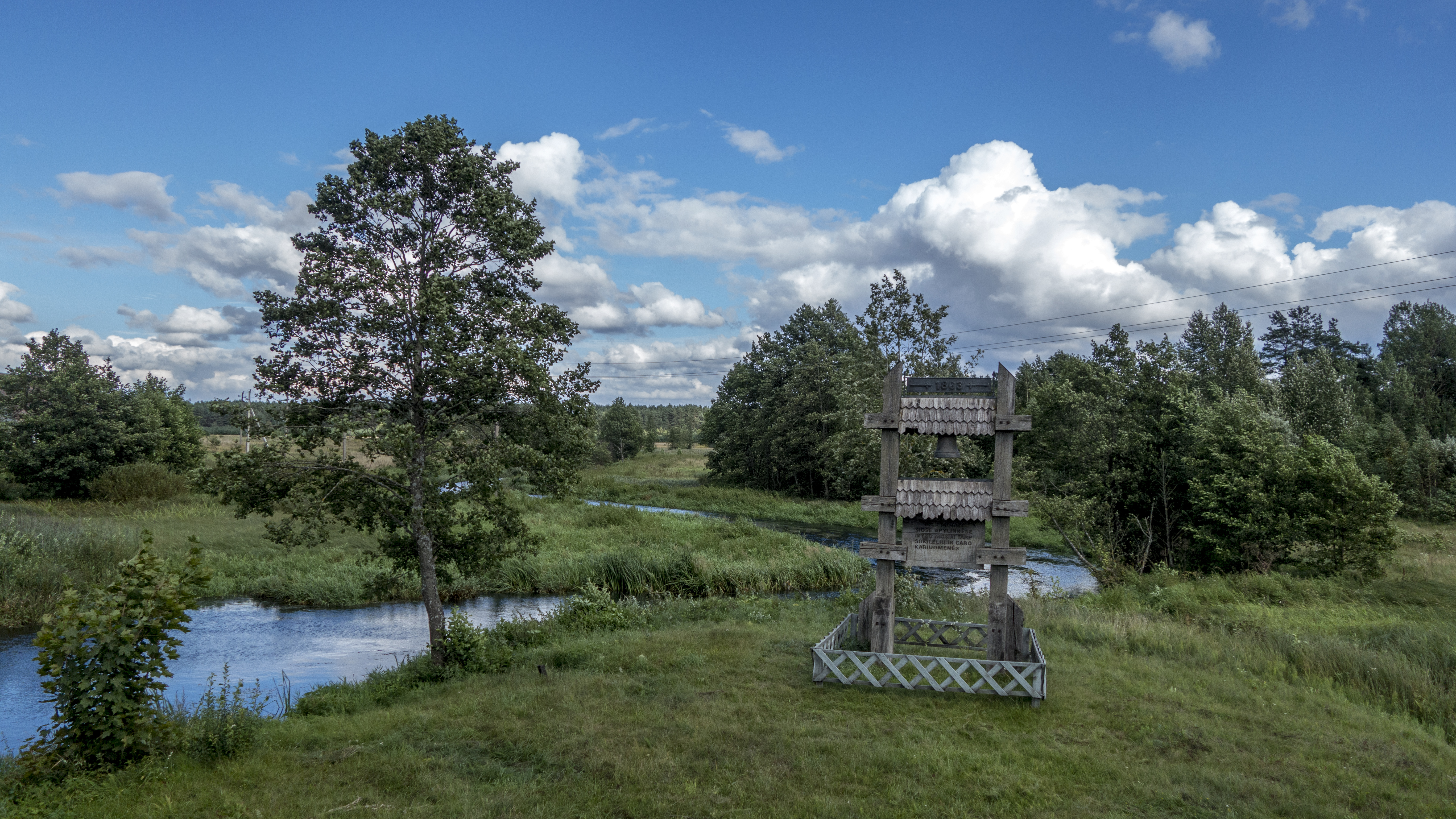 Merkys ties Rūdninkai